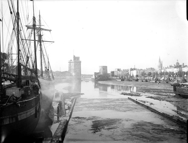 Fonds Trutat - Photographie ancienne Cote : TRU C 2261 Localisation : Fonds ancien (S 30) Original non communicable Titre : Sur le port, les tours, La Rochelle, septembre 1907 Auteur : Trutat, Eugène Rôle de l’auteur : Photographe Lieu de création : La Rochelle (Charente-Maritime) Date de création : 1907 Mesures : : 9 x 12 cm Observations : Note manuscrite de Trutat : " La Rochelle : sur le port, les tours, septembre 1907, Goerz-Anschutz, Jougla rose ". Un tirage papier. Mot(s)-clé(s) : -- Port -- Bateau à voiles -- Bateau -- Sable -- Océan -- Bassin d'eau -- Rampe -- Tour fortifiée -- Poitou-Charentes (France) -- Charente-Maritime (Poitou-Charente) -- La Rochelle (Charente-Maritime) -- Atlantique (océan) -- Tour de la Chaîne (La Rochelle) -- Tour Saint-Nicolas (La Rochelle) -- 20e siècle, 1e quart Médium : Photographies -- Négatifs sur plaque de verre -- Noir et blanc -- Paysages maritimes -- Goerz-Anschutz -- Jougla-Lumière Voir : TRU C 2243 Bassin d'échouage, La Rochelle, 1908 Bibliothèque de Toulouse. Domaine public